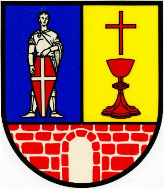 Coat of arms Elsdorf (Niedersachsen), Wappen der Gemeinde Elsdorf